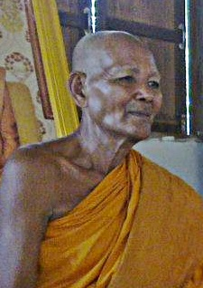 องค์ปัจุจบัน พระอาจารย์แสง